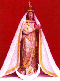 Nuestra Señora de la Defensa, Panotla, Tlaxcala, México.